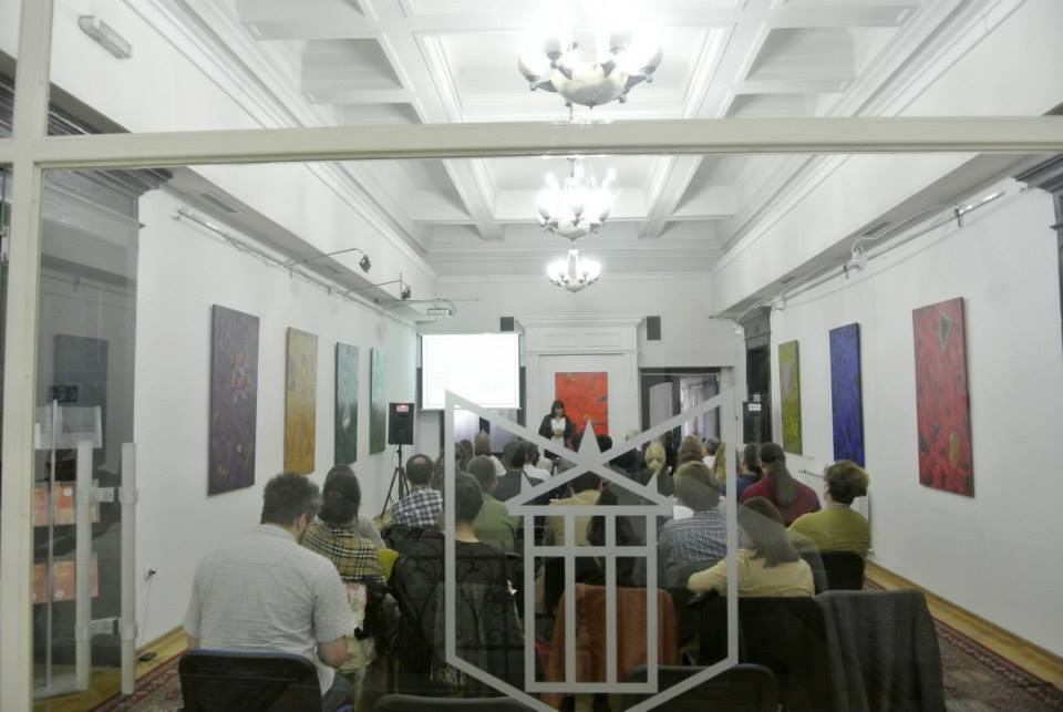 Српски (ћирилица): Уметнички центар